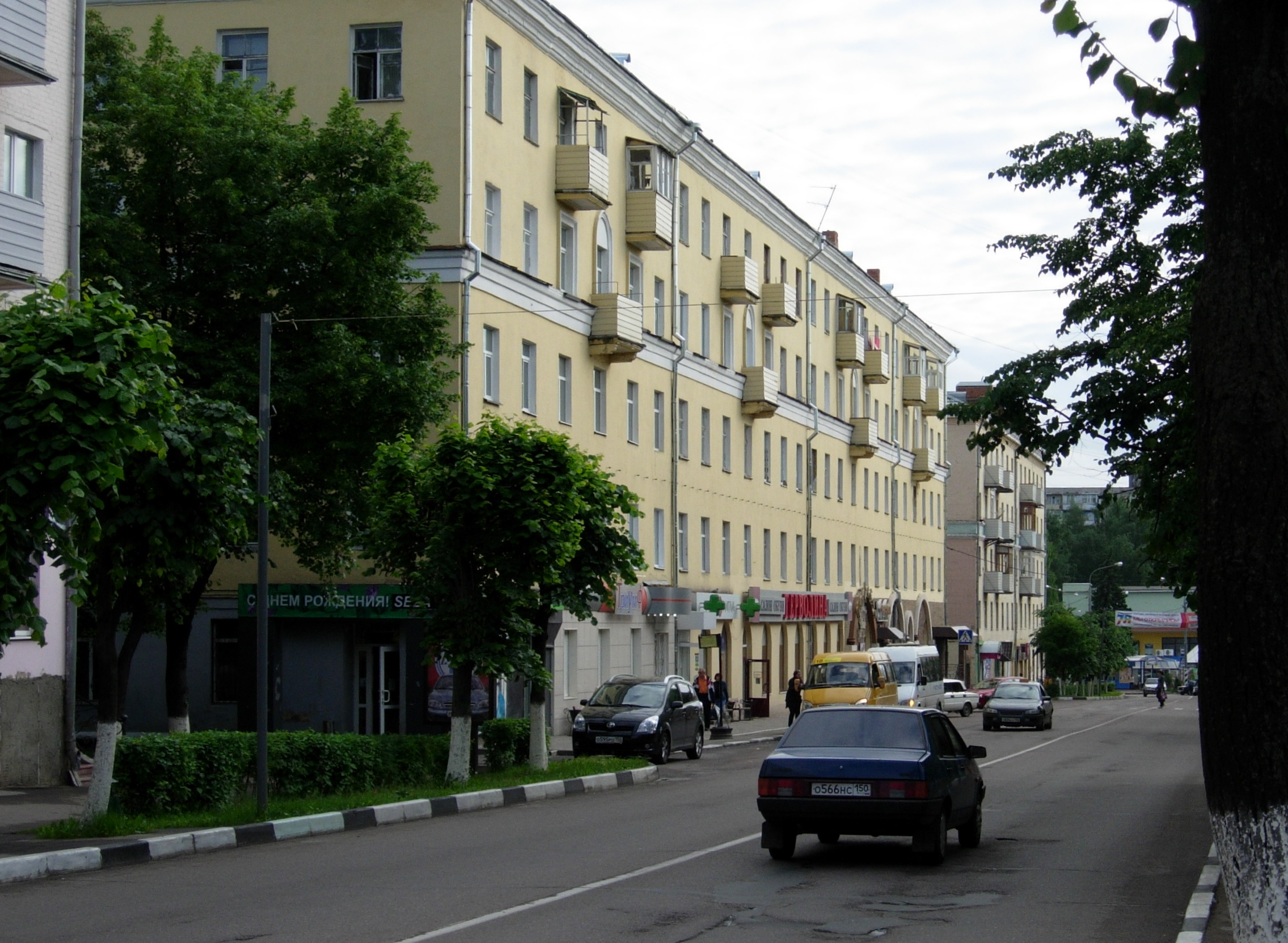 Streets in Klin